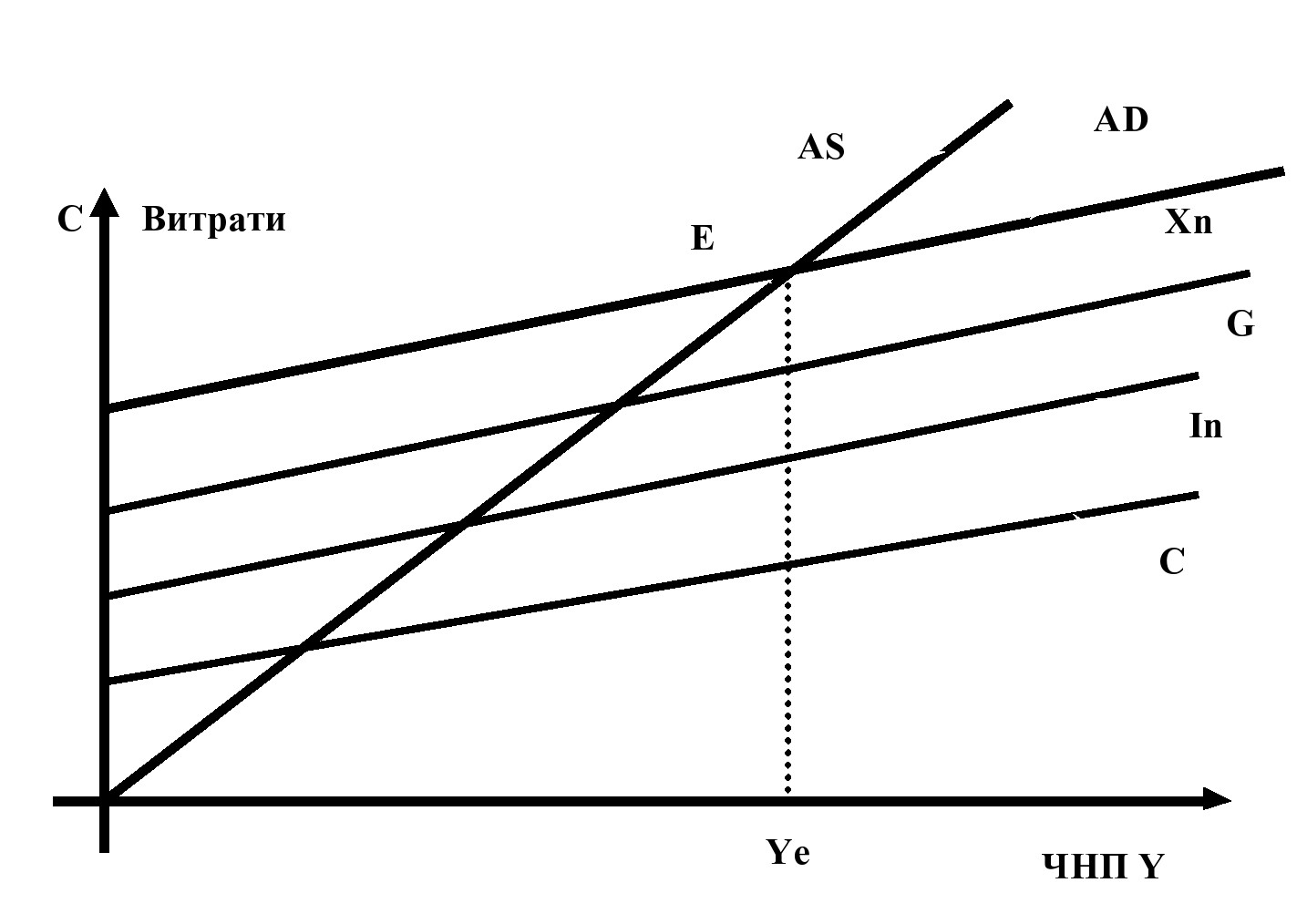 Графічна інтерпретація розширеної версії моделі "Кейнсіанського хреста"